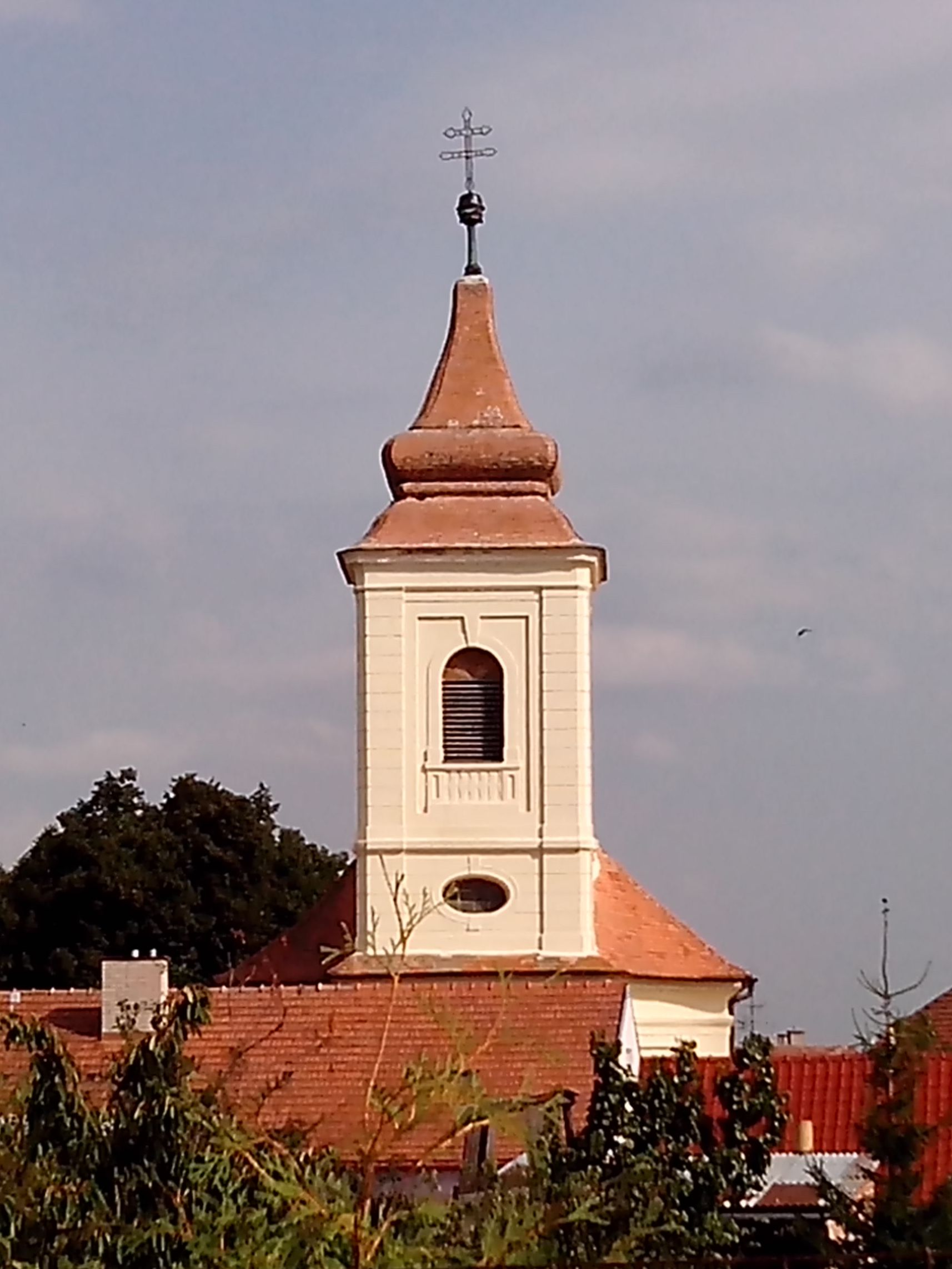 Bulhary - kostel sv. Jiljí